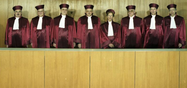 18.12.1989 Bundesverfassungsgericht Karlsruhe I. Senat in alter Zusammensetzung (bis 15.6.1989) v.li.: Prof. Dr. Alfred Söllner, Dr. Otto Seidl, Prof. Dr. Hermann Heußner, Präsident Prof. Dr. Roman Herzog, Dr. Gisela Niemeyer, Prof. Dr. Johann Friedrich Henschel, Prof. Dr. Dieter Grimm, Prof. Dr. Thomas Dieterich